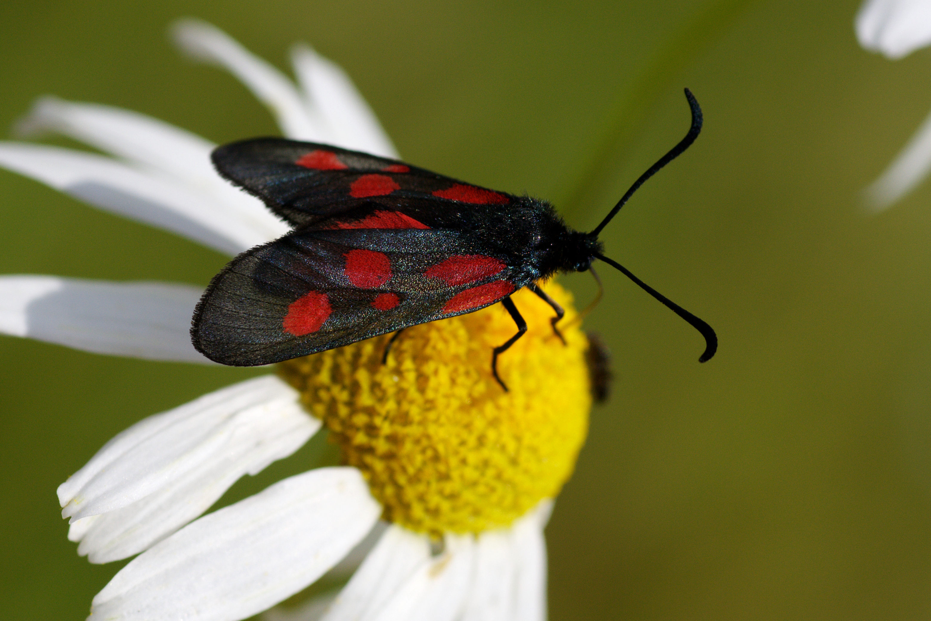 Aasa-verikireslane, Põlvamaal